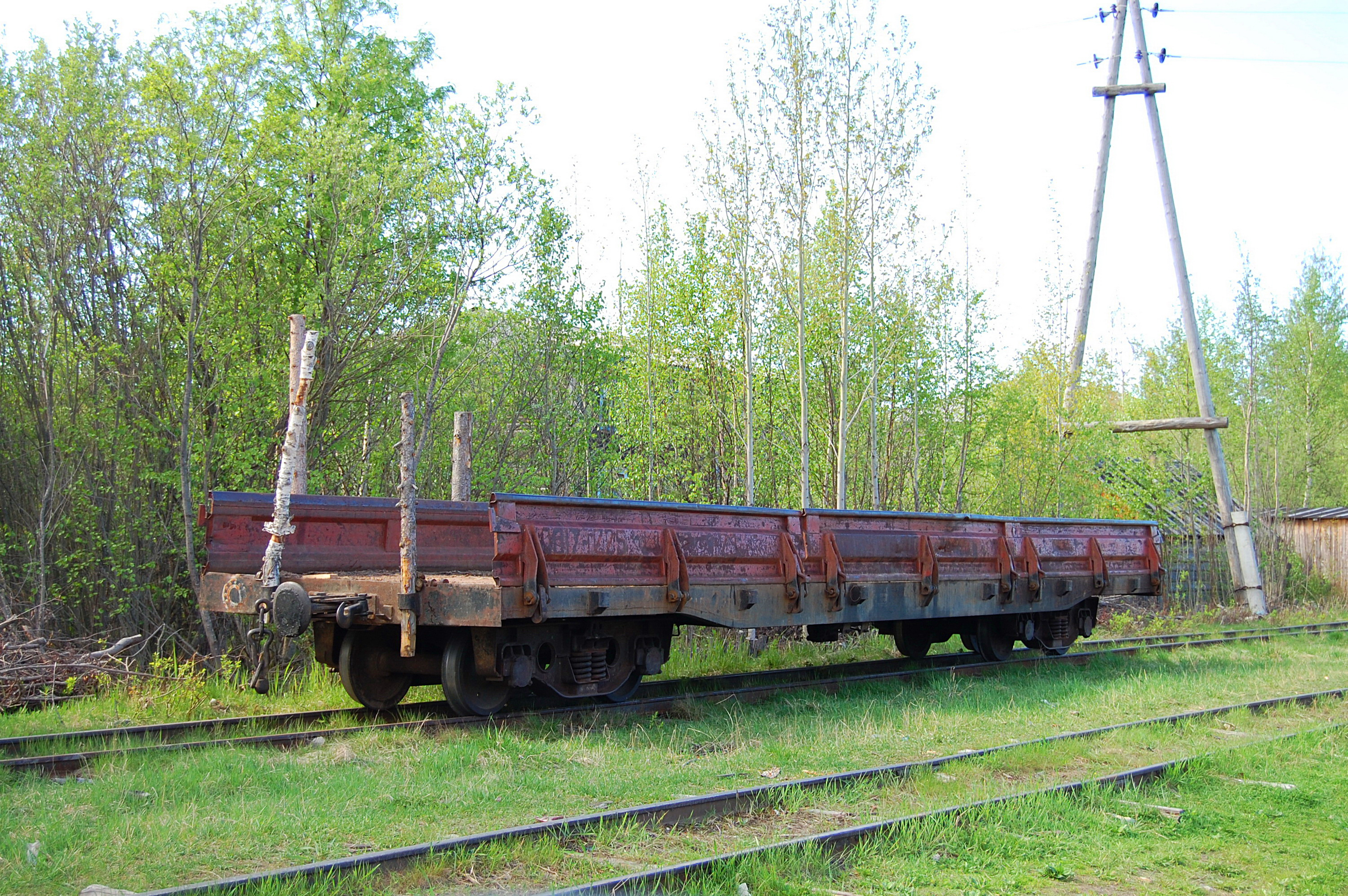 Платформа